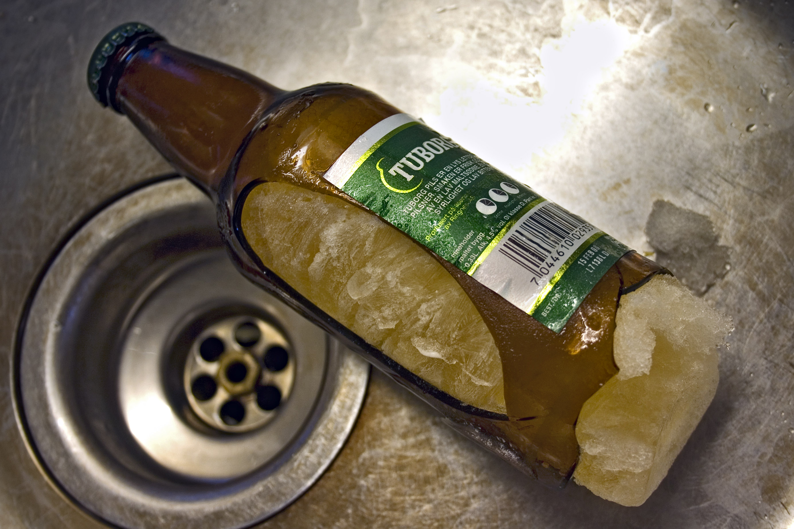 Close-up einer eisgesprengten Bierflasche